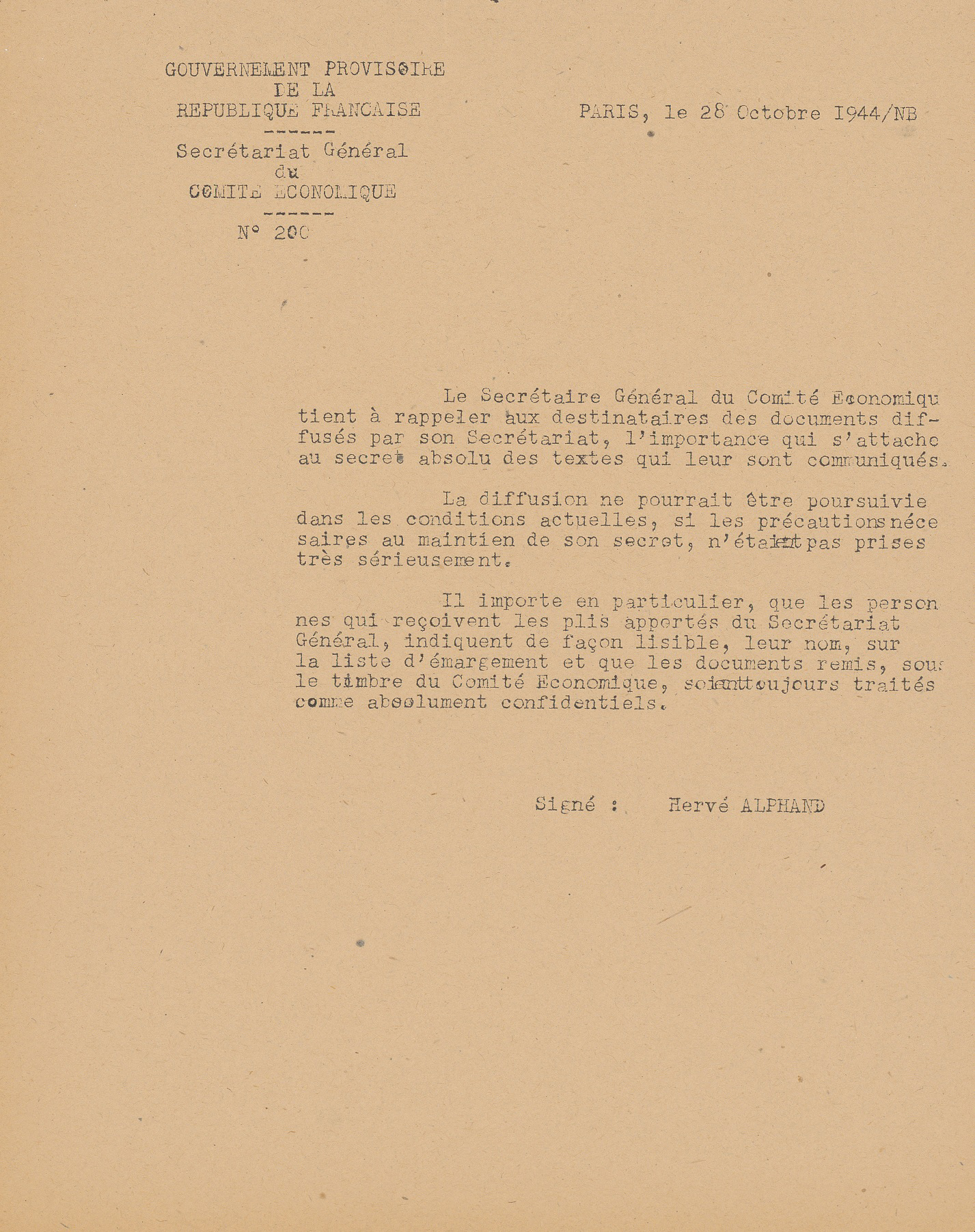 Lettre dactylographiée de Hervé Alphand, secrétaire général du Comité économique du GPRF, insistant sur le secret absolu à maintenir autour des textes transmis par le Comité